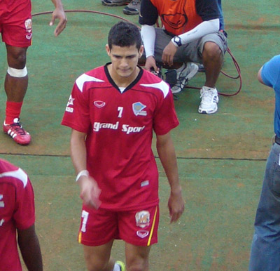 René Desaeyere